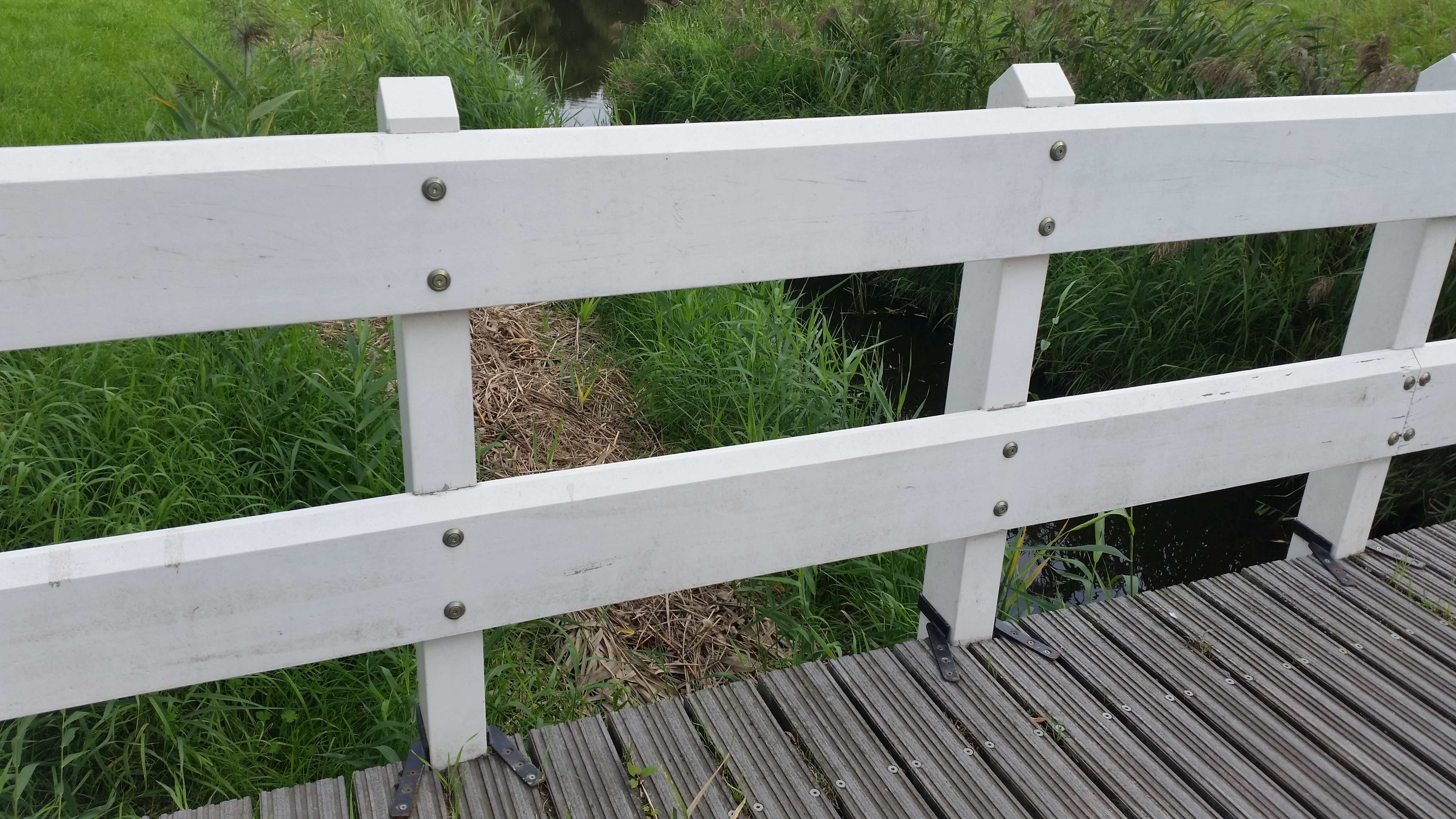 Brug 399 (in Amsterdam), houten leuning